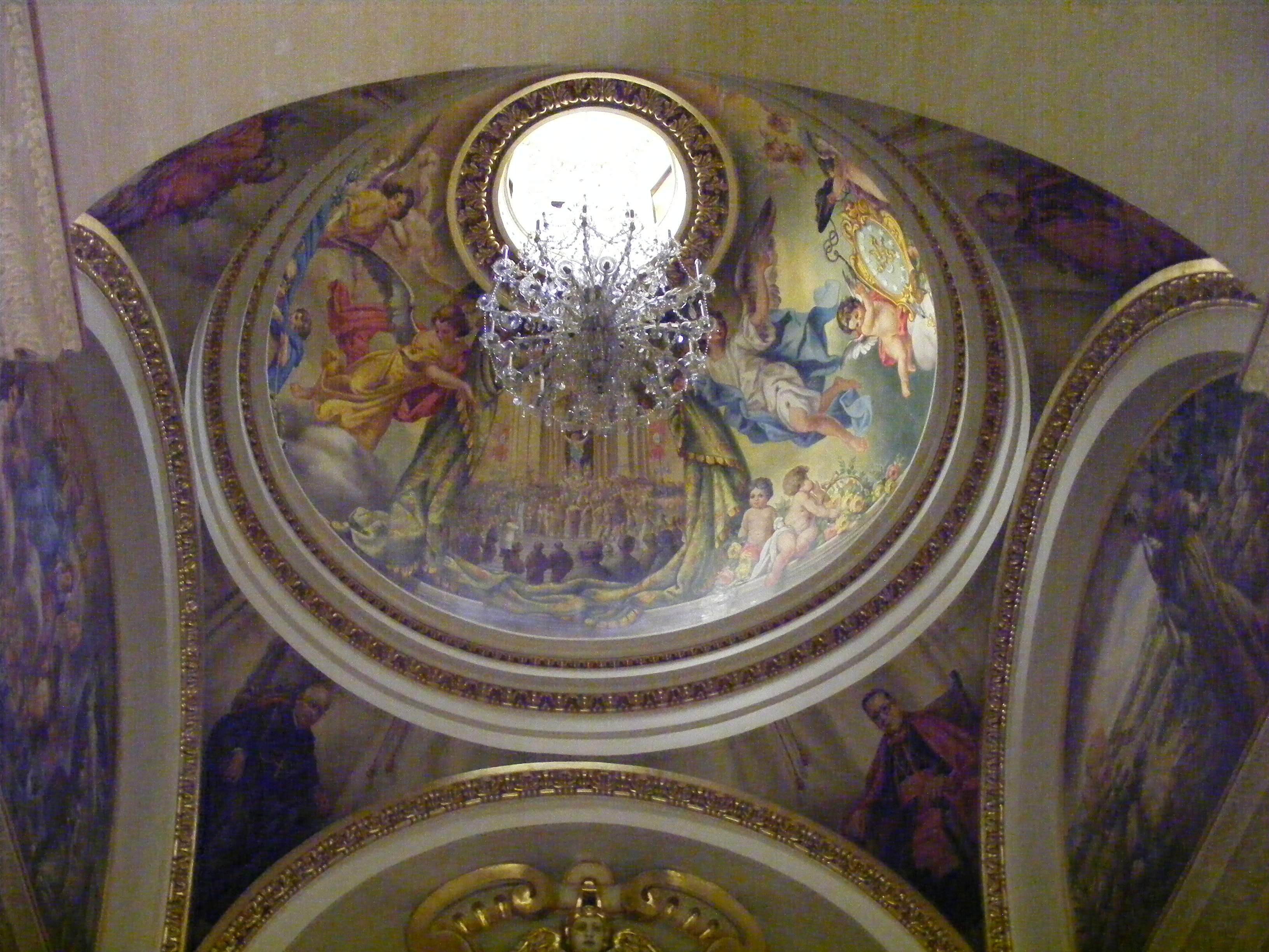 Malarstwo na kopule kaplicy z wejściem do zakrystii przedstawia podarowanie statuy Wniebowziętej do katedry. Obrazy wykonał Pawlu Camilleri-Cauchi w 1997.